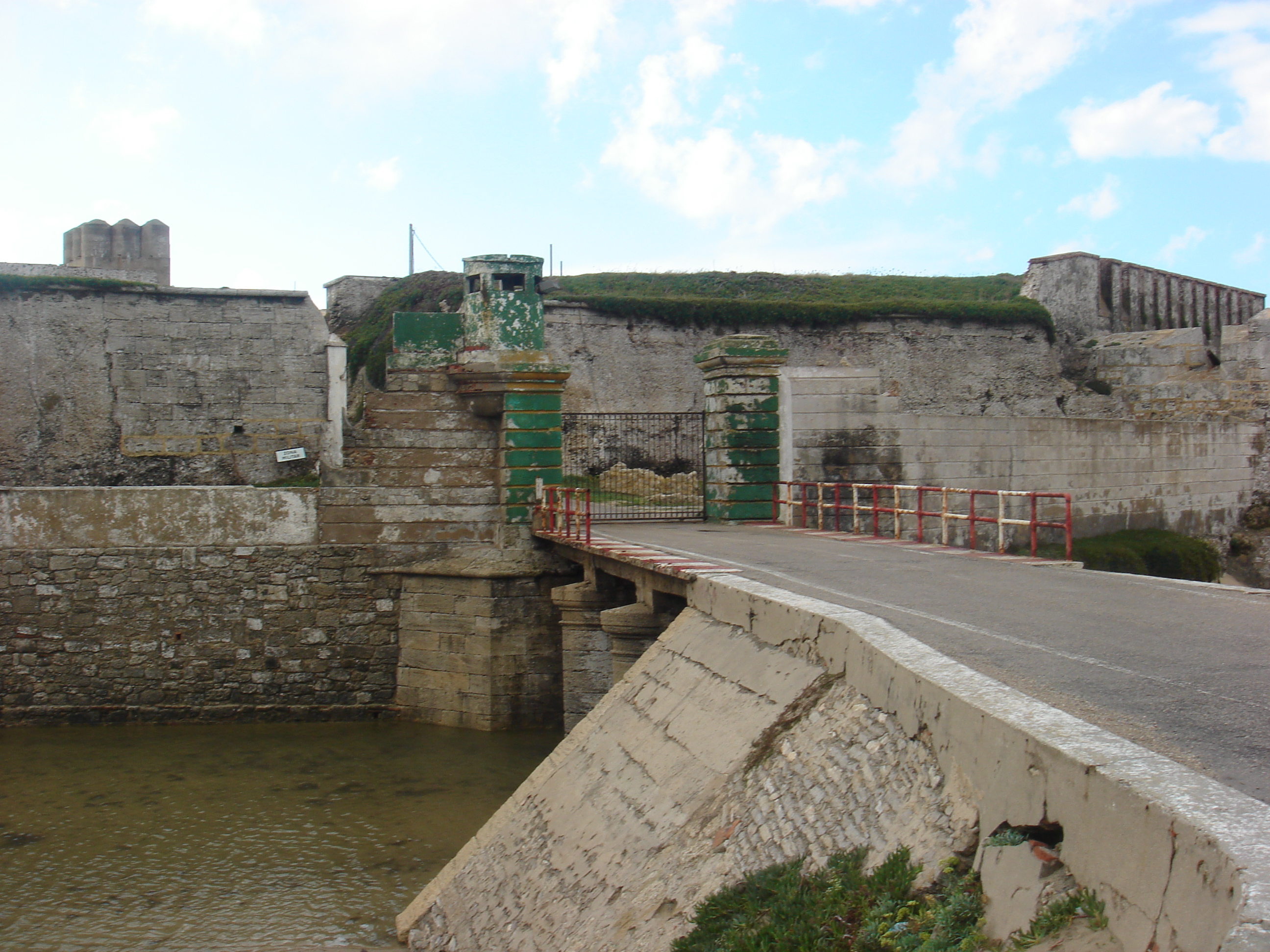 Entrada de la Isla de las Palomas cerrada al público